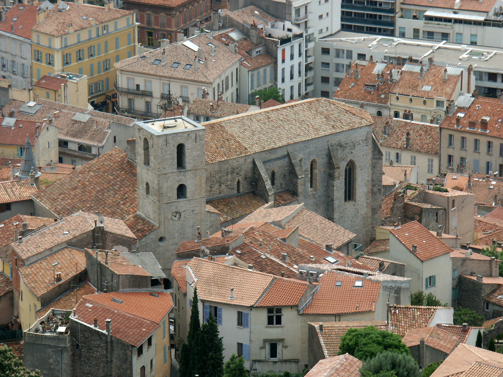 Hyères, église Saint-Paul. Elle est citée pour la première fois en 1182 dans un acte du comte de Provence Alphonse 1er. Elle est citée ensuite en 1221 comme église paroissiale. Elle a été érigée en collégiale en 1572. La photo a été prise depuis le point de vue du château.